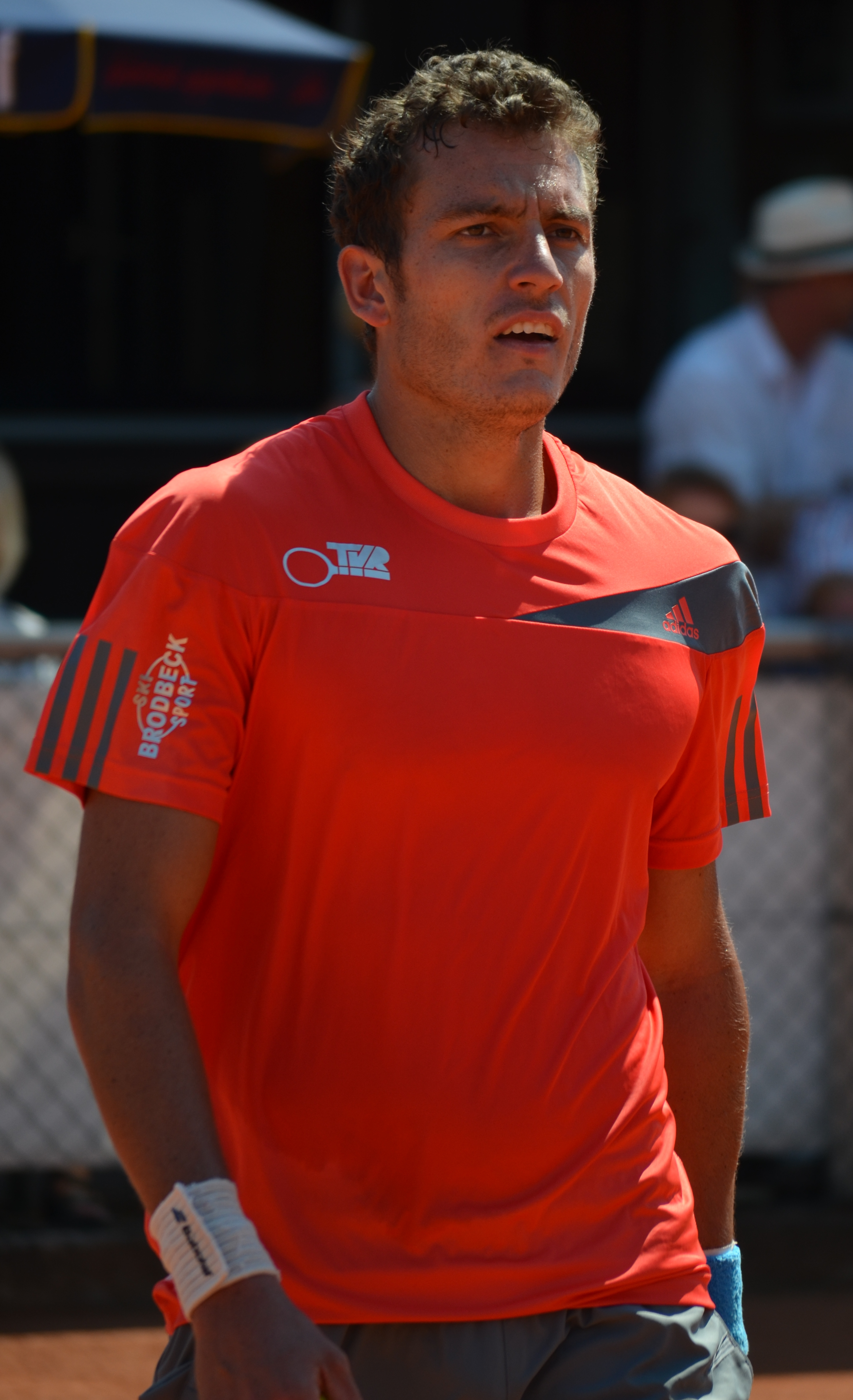 Alessandro Giannessi in der Begegnung gegen Dennis Bloemke 2. Tennisbundesliga SC Uttenreuth gegen TV Reutlingen am 2. August 2015